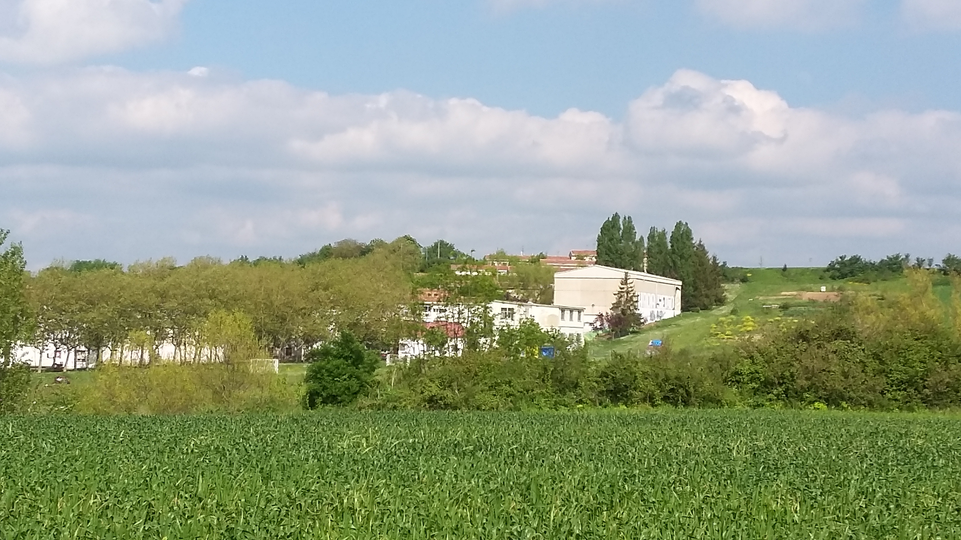 Barrio de Errekaleor, Vitoria-Gasteiz, Álava, País Vasco (España). Vista general.